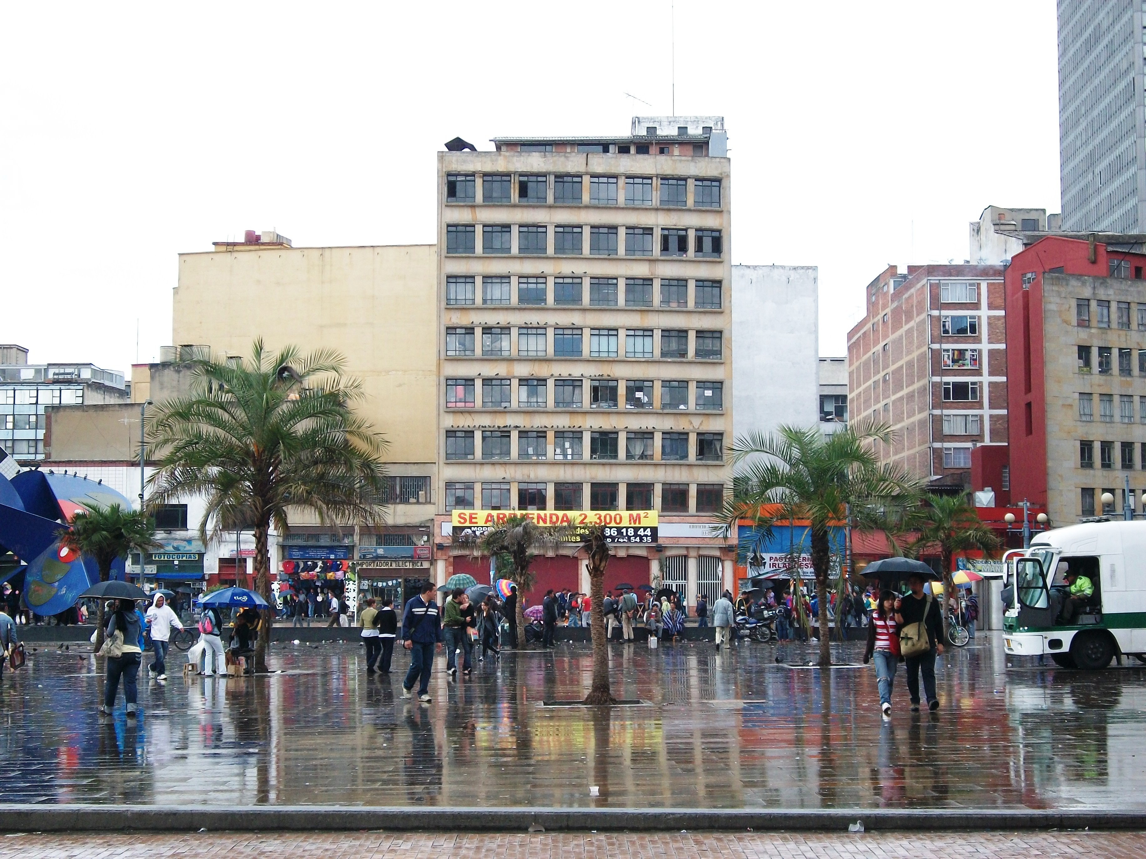 Bogotá, plaza de San vitorino